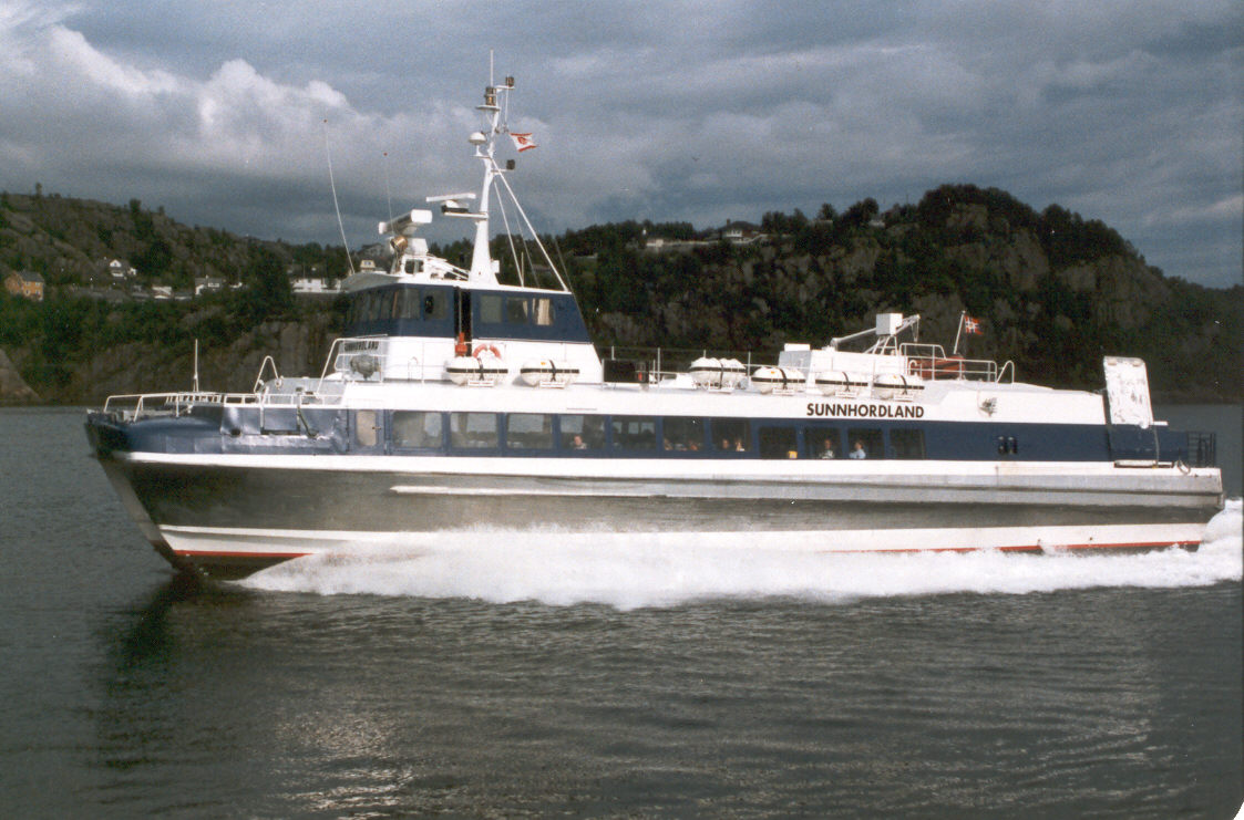 MS Sunnhordland enroute Sunnhordland - Bergen (Norway)